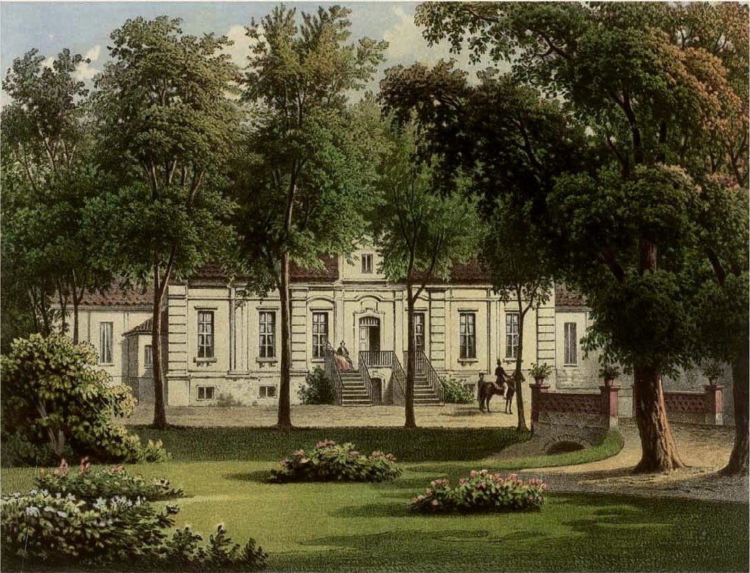 Rittergut Fredersdorf, Kreis Zauche-Belzig, Provinz Brandenburg